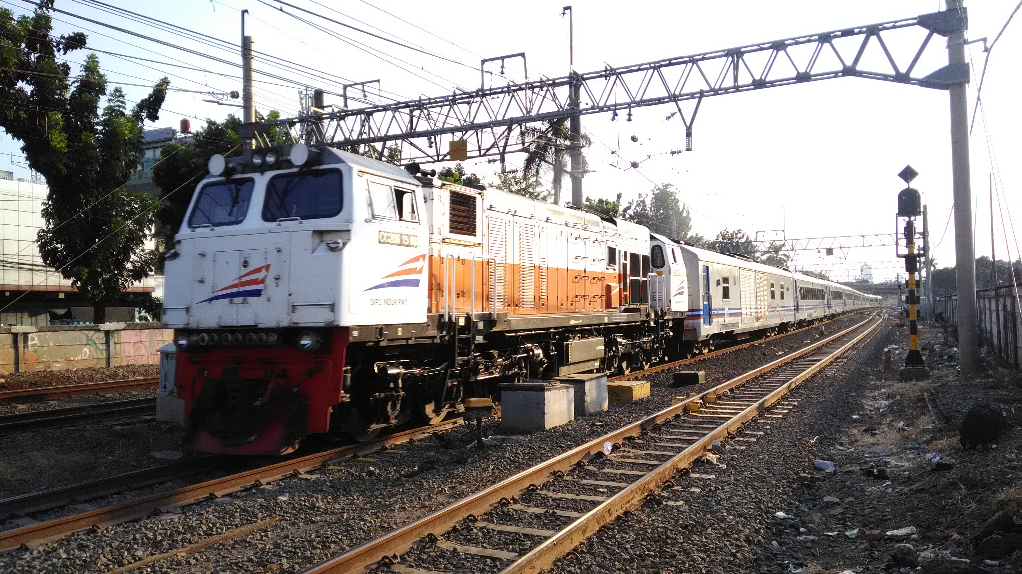 Sunda: Kareta api Bima